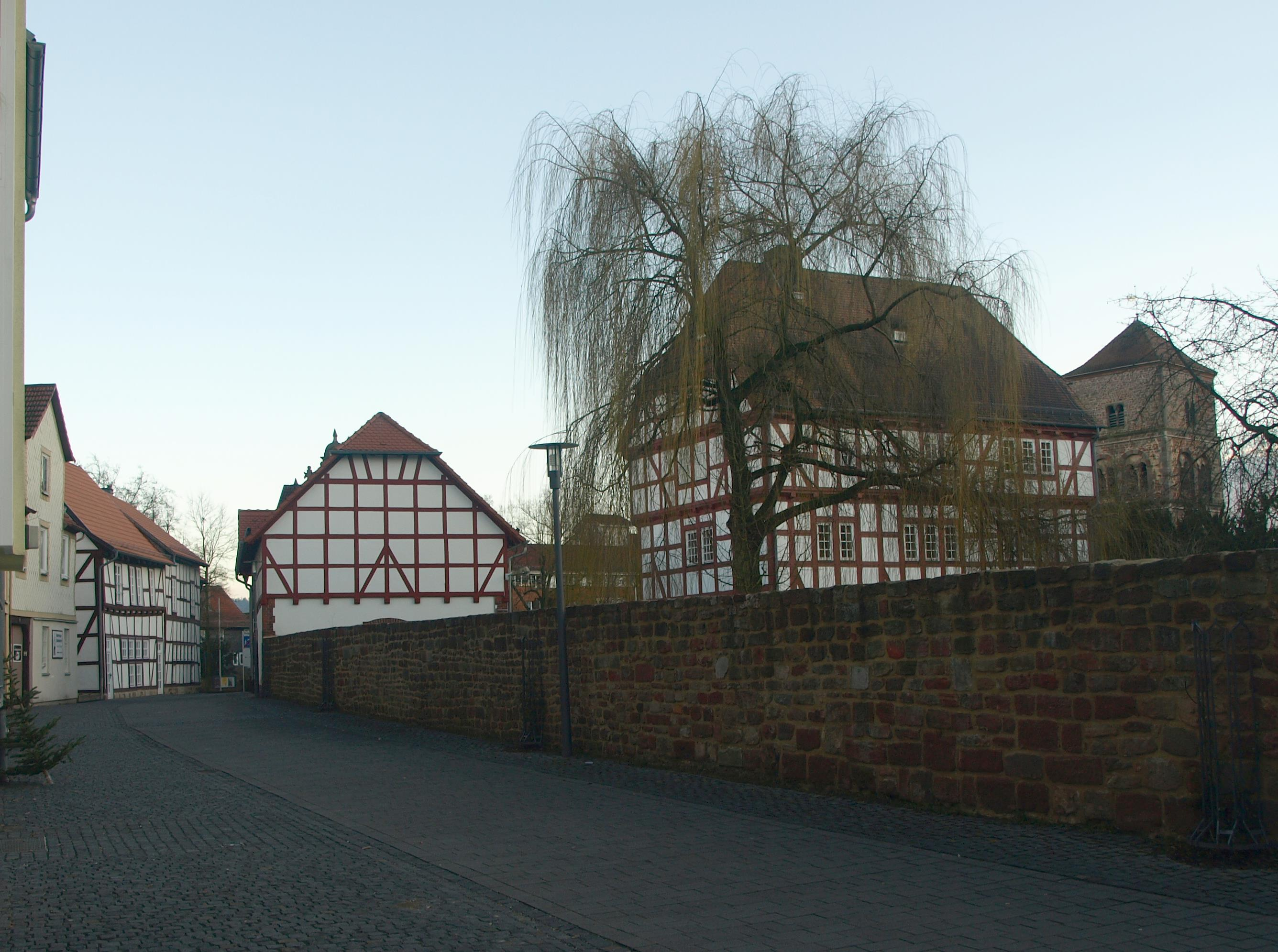 Die Burggasse in Bad Hersfeld. Sie führt entlang der Klostermauern. Die Gebäude in der Bildmitte gehörten zum Stadtschlösschen, der Residenz des letzten Abtes und später der Stadthalter des Landgrafen